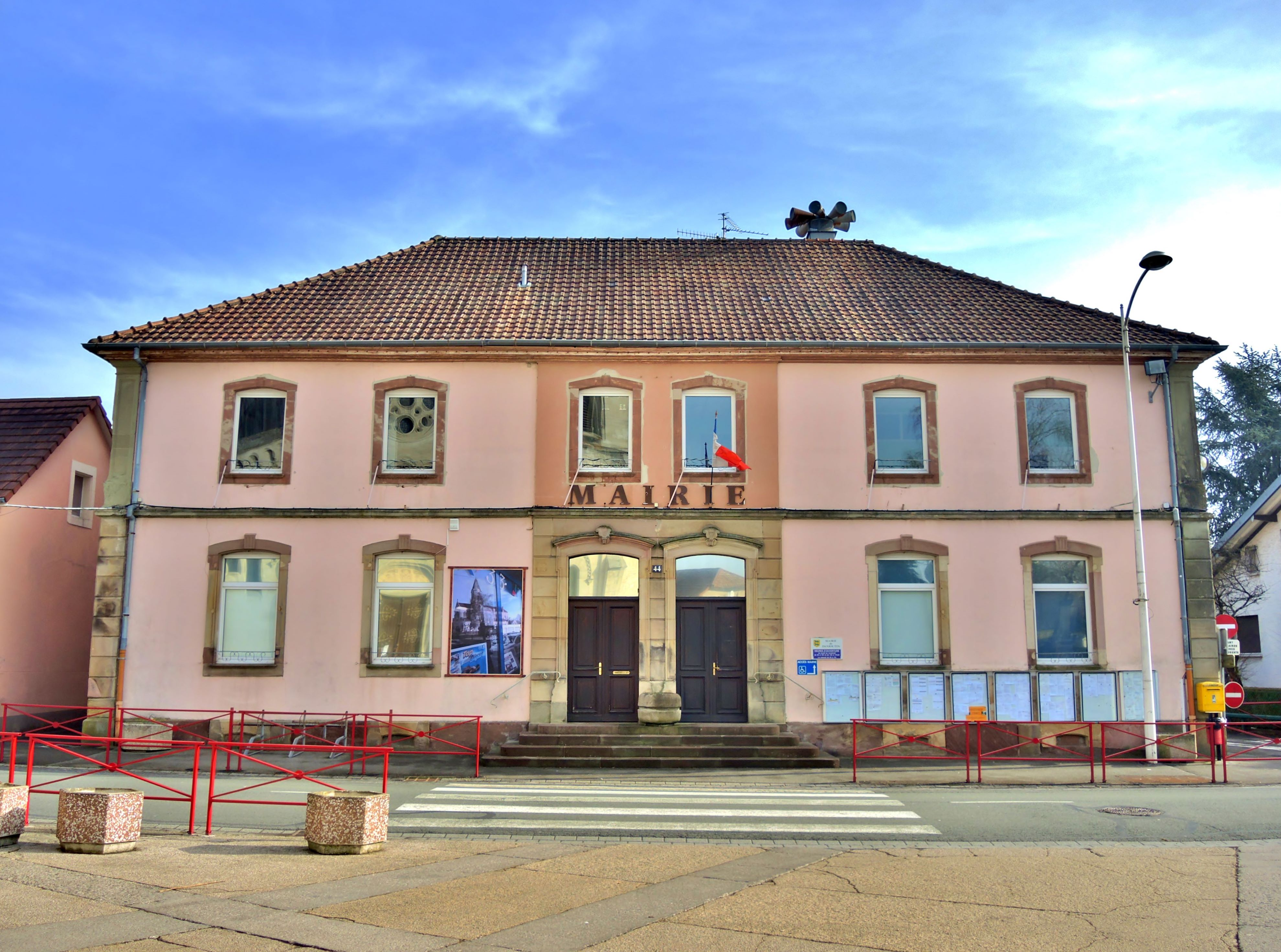 Façade de la mairie de Danjoutin